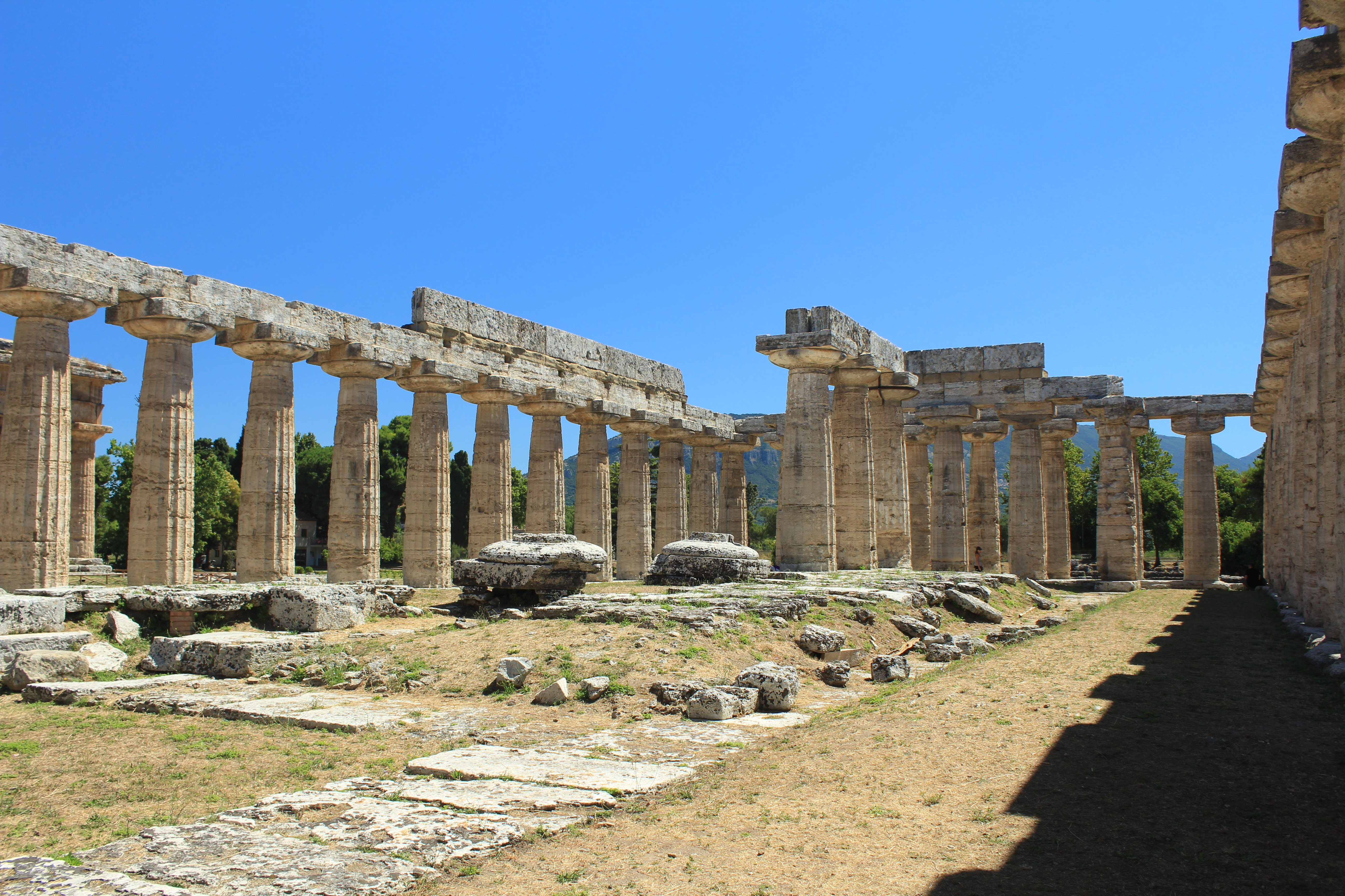 Tempio della Pace This is a photo of a monument which is part of cultural heritage of Italy.